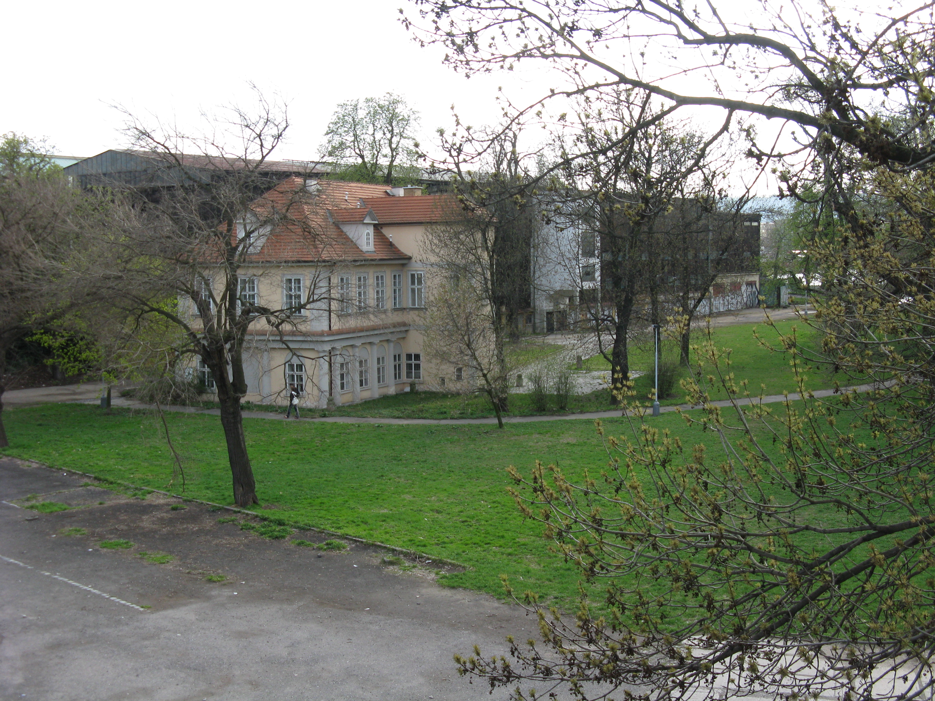 Zimní stadion na Štvanici, pohled z Hlávkova mostu na severní a východní část stadionu. Rovněž je vidět klasicistní dům čp. 858 holešovického katastru.